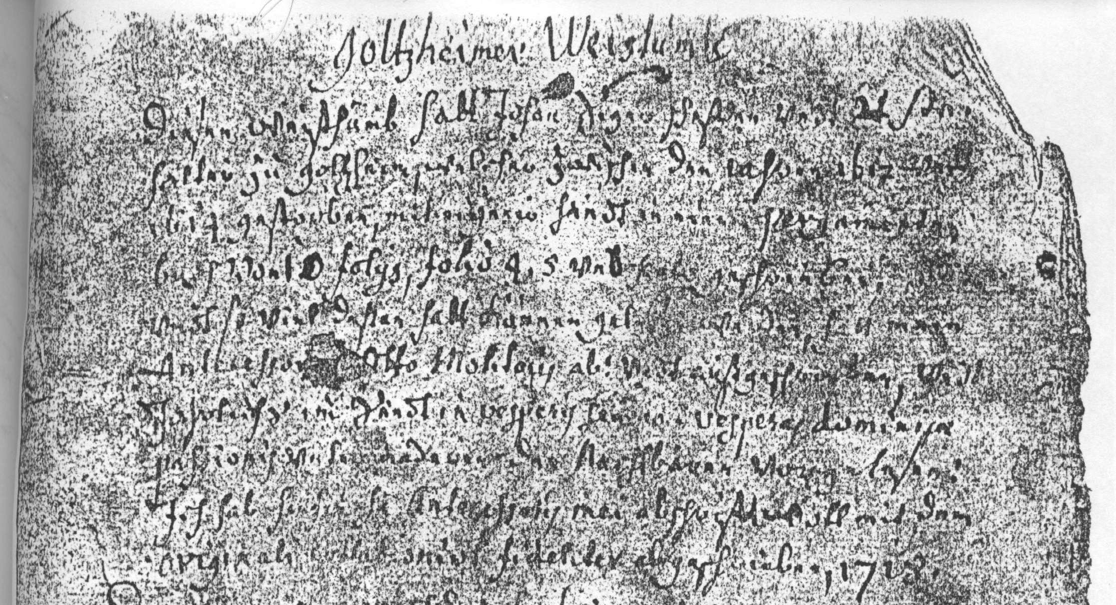 Einleitung zur Abschrift des Golzheimer Weistums, Otto Curtius 1718 Goltzheimer Weistumb Diesen Weisthumb hatt Johan Siger Scheffen undt Statthalter zu Goltzheim, welcher zwischen den Jahren 1612 undt 1614 gestorben, mit eigener Handt in einem pergamenten Buch von 10 folys [Seiten], folio [auf Seite] 4., 5. und sexto [sechster] geschrieben, undt so viel dessen hatt können gelesen werden, hatt mein antecessor [Vorgänger] He. [Herr] Otto Molitoris ab- undt außgeschrieben, undt jahrlichs im Sendt in vesperis seu post vesperas dominicae passionis unter anderen den Nachtbaren vorgelesen. Ich hab hiehin He. [Herrn] antecessoris mei [meines Vorgängers] Abschrift woll mit dem originali [Original] collationirt fideliter abgeschrieben 1718.